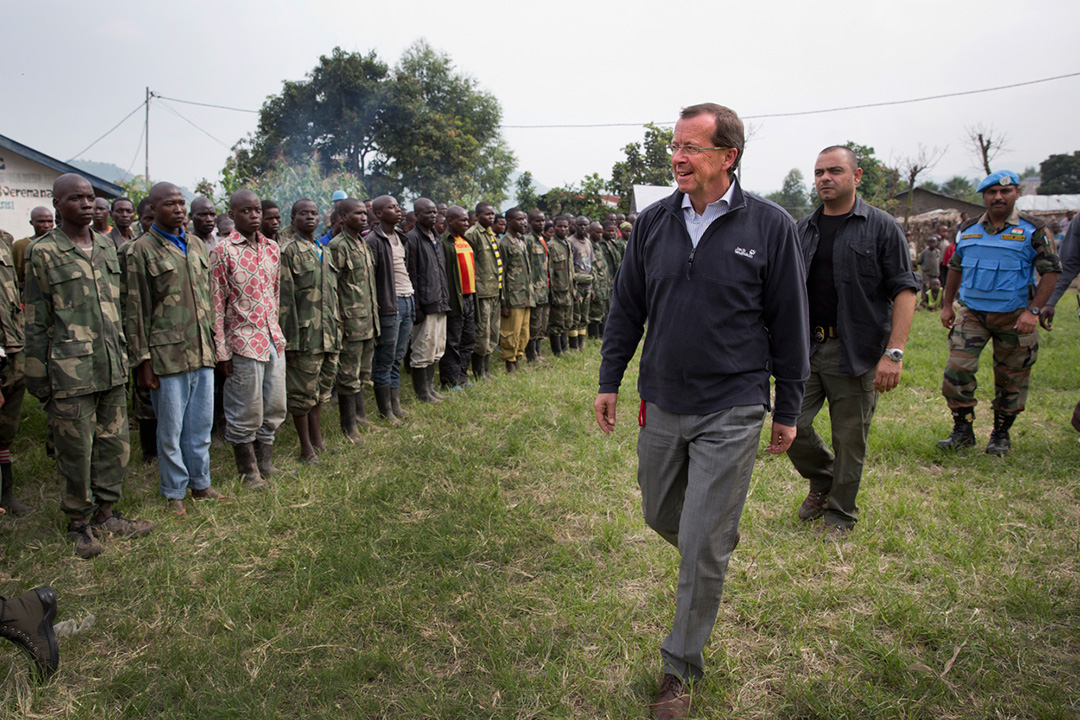 SRSG Martin Kobler arriving in Bweremana on 18 December 2013, a town 60 km north of the provincial capital Goma. Bweremana is currently serving as a transit camp to combatants of armed groups who have decided to lay down their arms. Photo: MONUSCO/Sylvain Liechti Le Représentant spécial du Secrétaire général de l’ONU en RD Congo, Martin Kobler, à son arrivée le 18 décembre 2013 à Bweremana, une localité située à 60 km au Nord de la capitale provinciale Goma. Bweremana sert actuellement de camp de transit aux combattants de groupes armés qui ont décidé de déposer les armes. Photo : MONUSCO/Sylvain Liechti